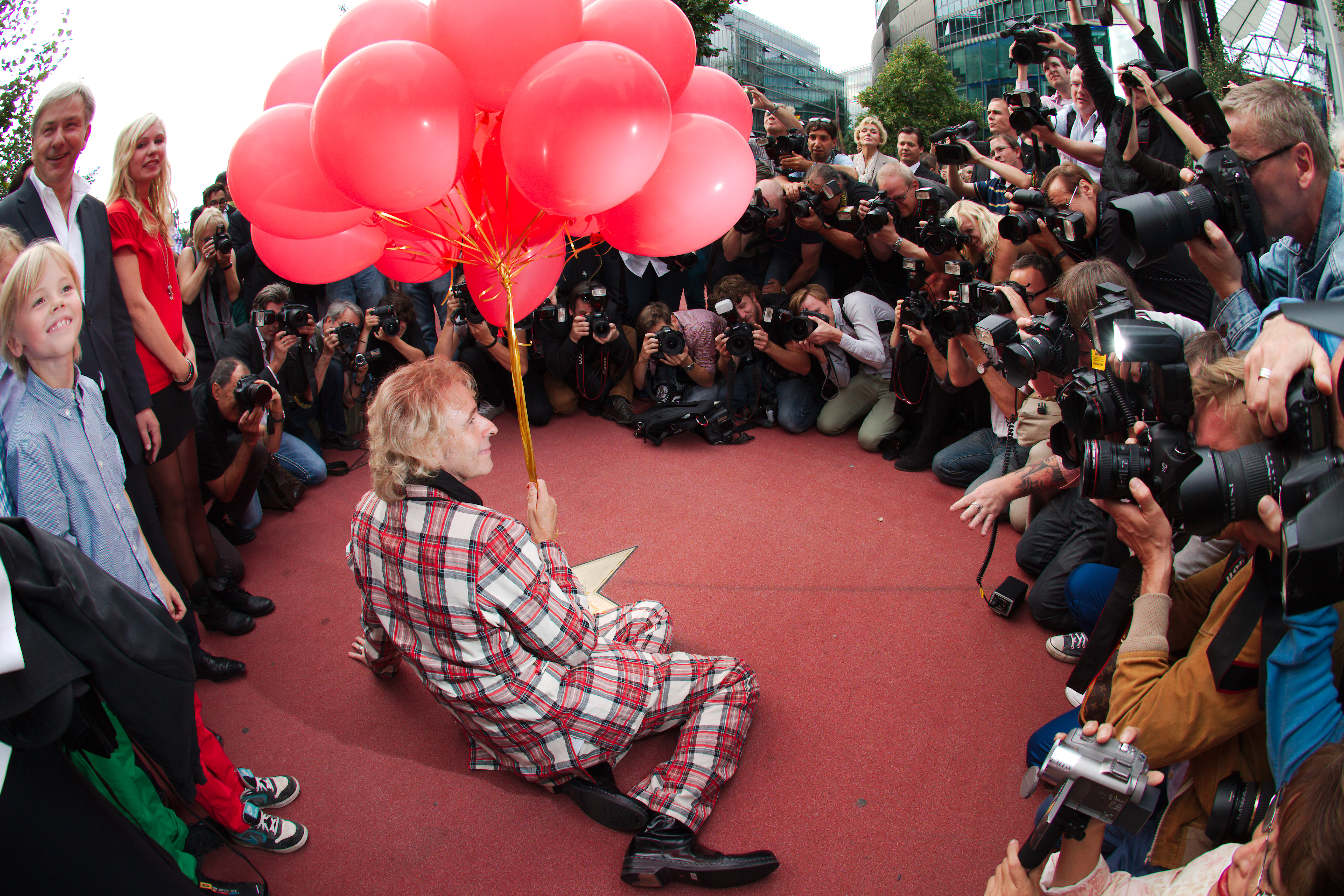 Auf seinem neuen Stern